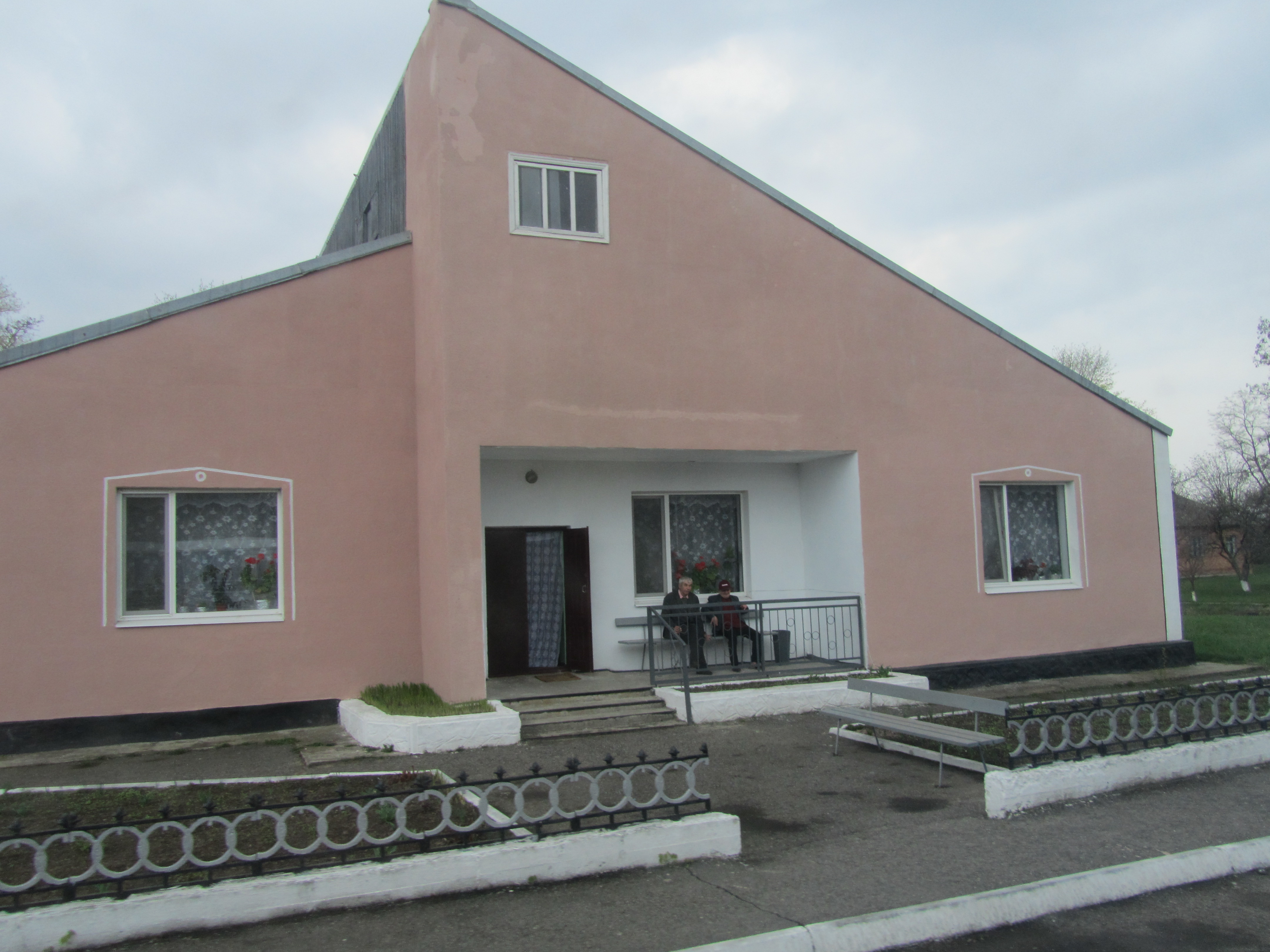 Лікарня у селі Пронозівка Глобинського району